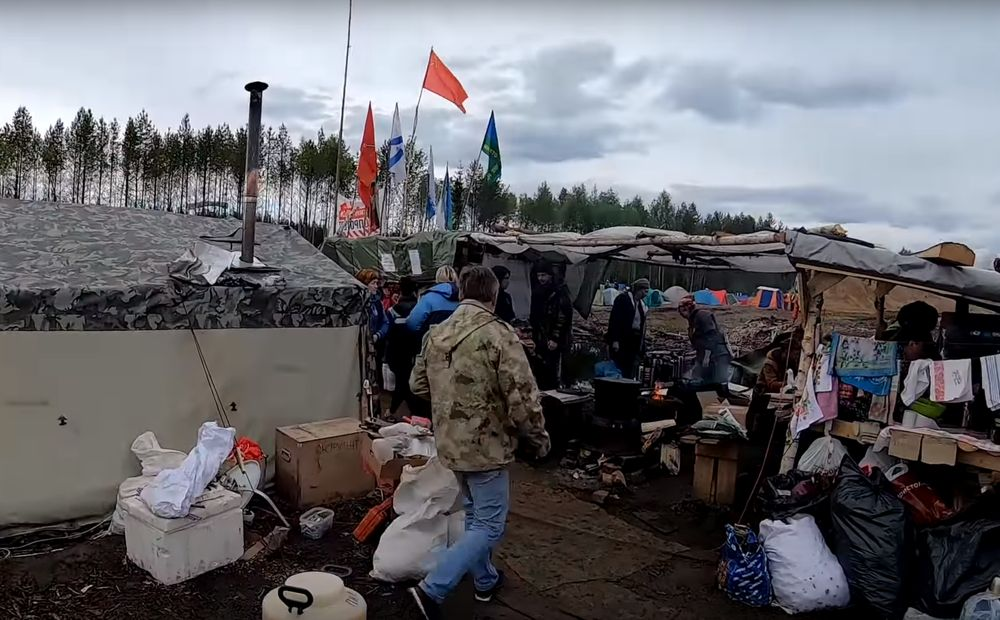 Палаточный лагерь во время мусорного протеста на станции Шиес Архангельской области в июне 2019 года. Фото сделано участником протеста.